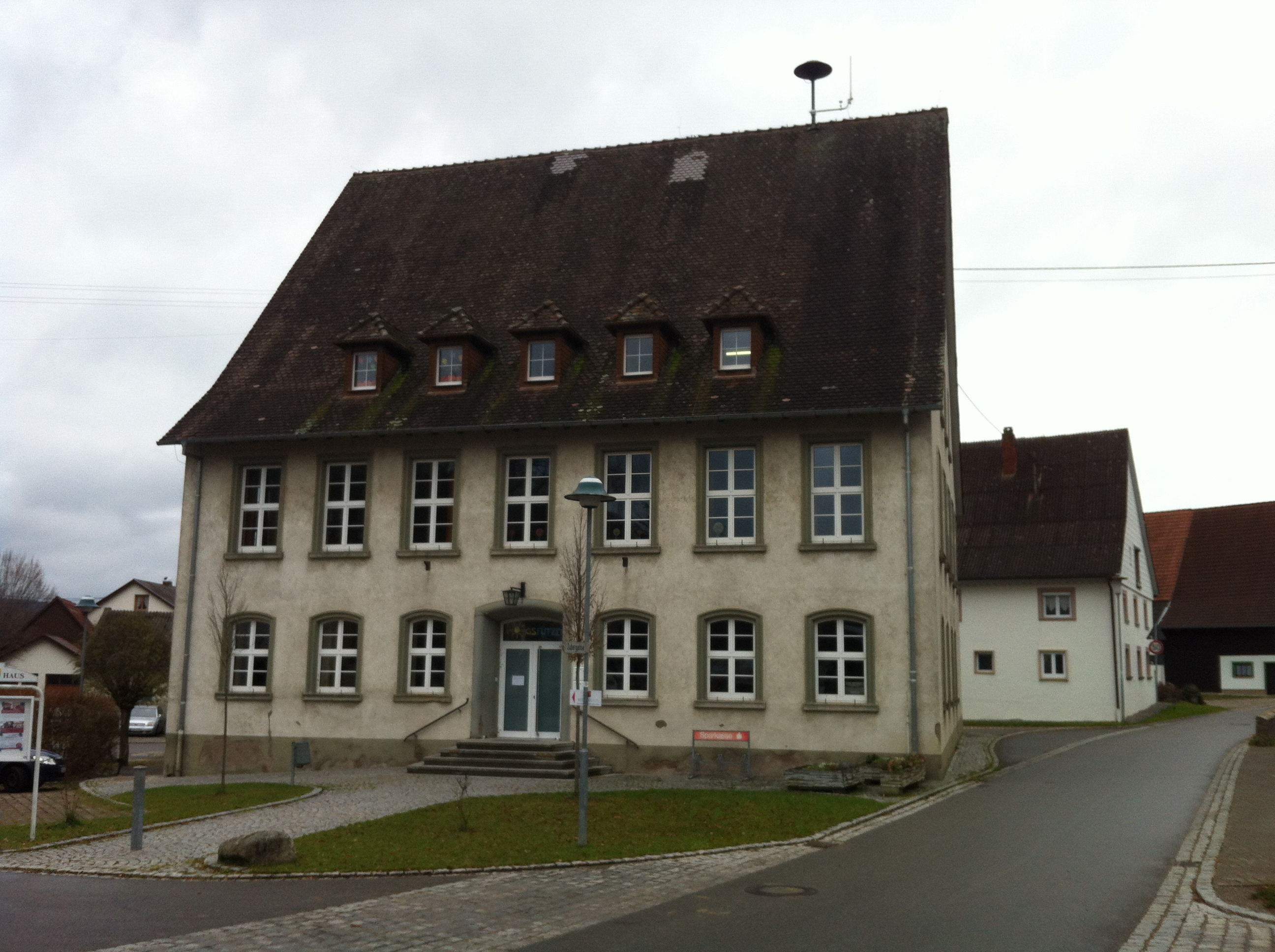 Rathaus in Fützen, Ortsteil von Blumberg, Stadt im Schwarzwald-Baar-Kreis in Baden-Württemberg.Nach Abbruch des alten Rathauses 1784–1788 errichtetes Schul- und Rathaus. 1902 umgebaut. Nach großen Beschädigungen im April 1945 wieder aufgebaut und 1951 eingeweiht.